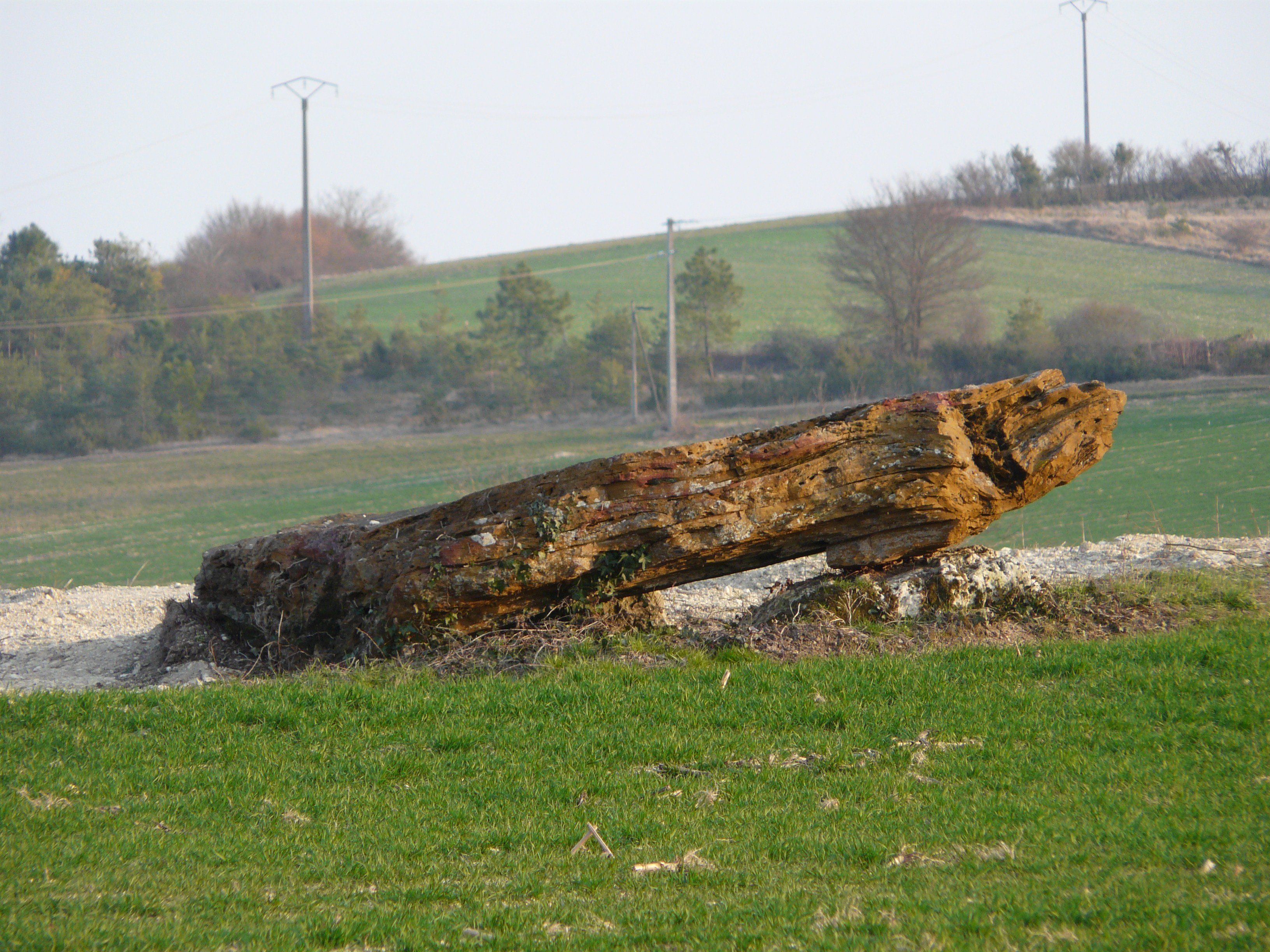 Dolmen de Laprougès à Valeuil, Dordogne, France